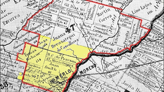 Mapa del Partido de Merlo en 1864. El mapa está orientado de sur a norte, en una posición invertida. El mapa ha sido retocado por mí para delimitar la extensión del partido en 1864 (en rojo difumado) y la extensión actual de Merlo (en amarillo difumado).